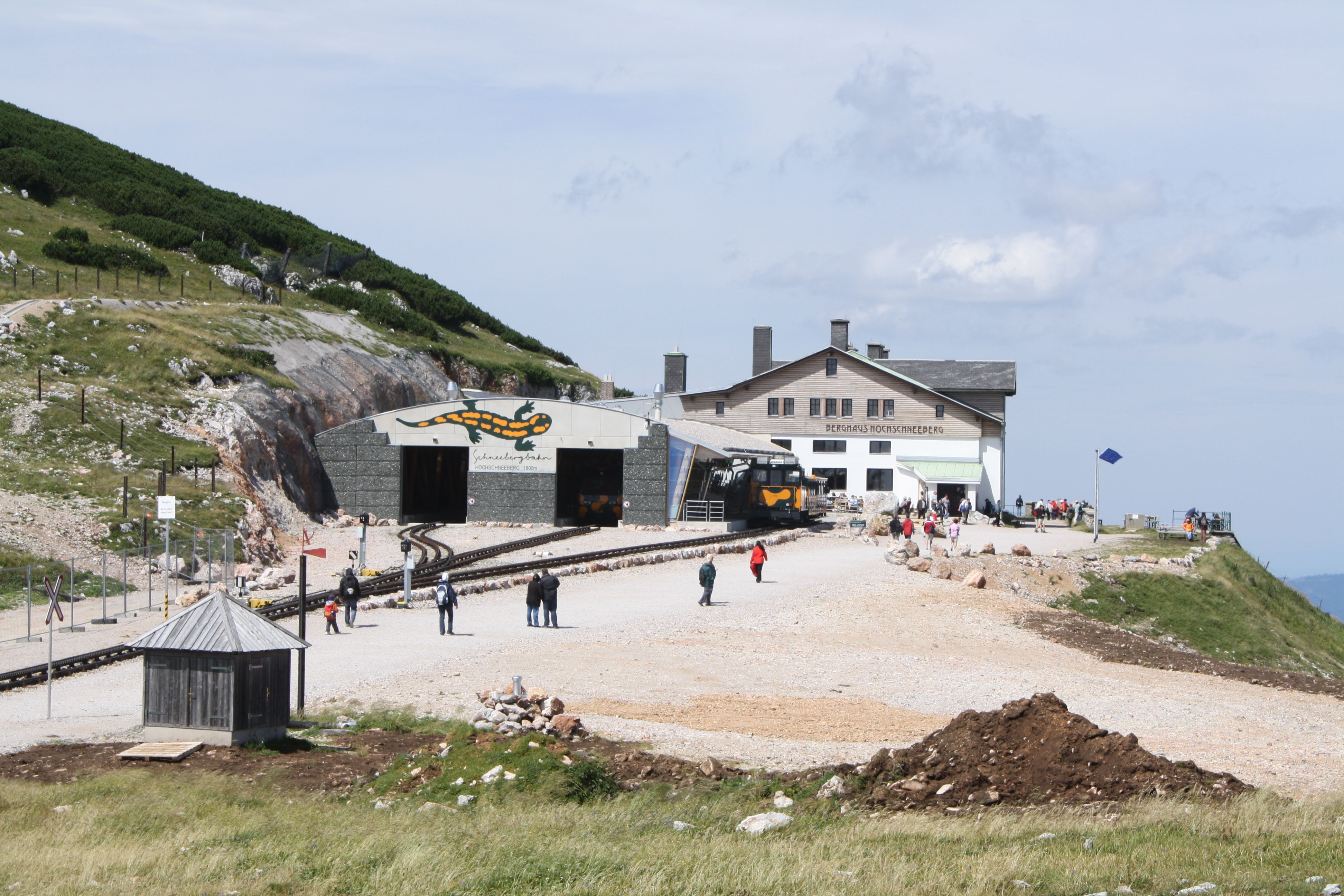 Schneeberg (Niederösterreich), Bahnhof Hochschneeberg